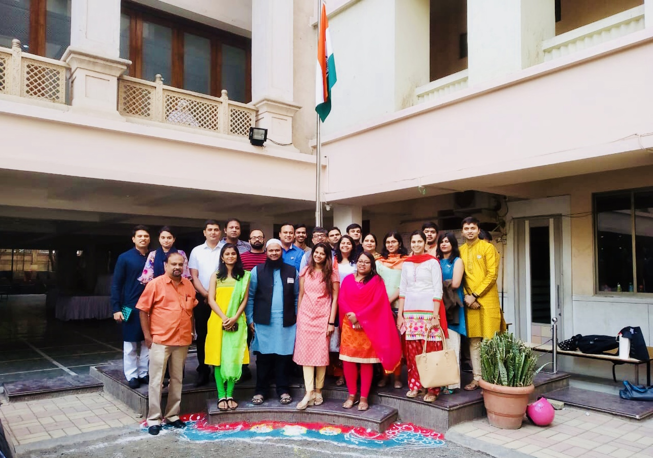 सृजन हिंदी टोस्टमास्टर्स संस्था, पुणे